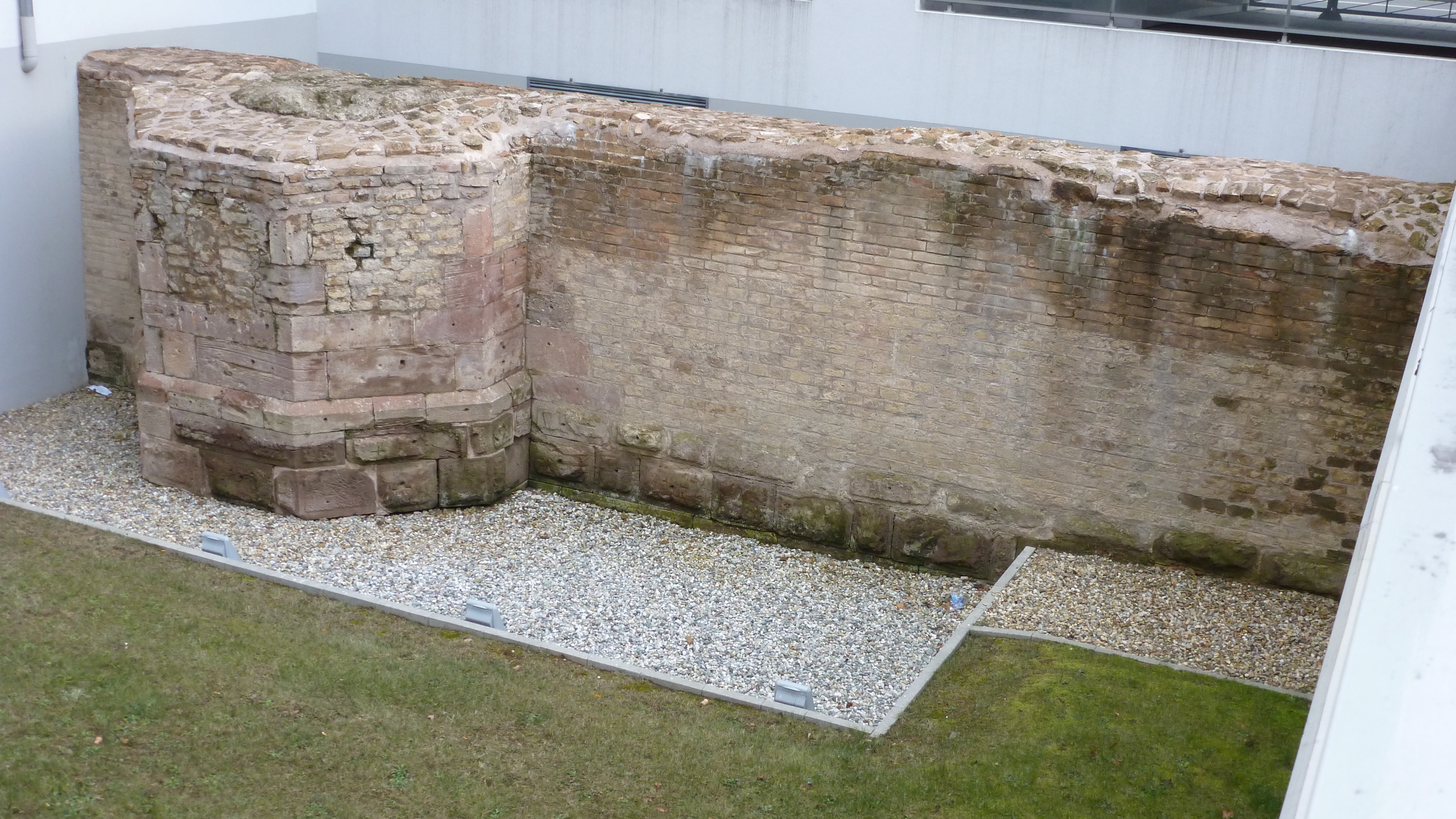 Vestige de l'enceinte médiévale de Strasbourg, boulevard du président Wilson, rue George Wodli. Cette muraille fut construite au XIVe siècle suite à l'agrandissement de la ville. Actuellement elle est dans un hôtel mais on peut voir les vestiges (muraille et tour octogonale).